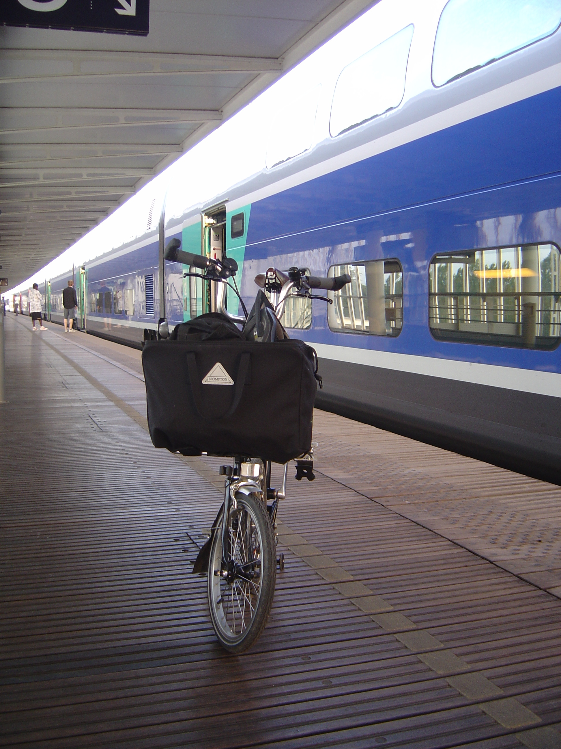 Brompton sur le quai de la gare TGV d'Avignon